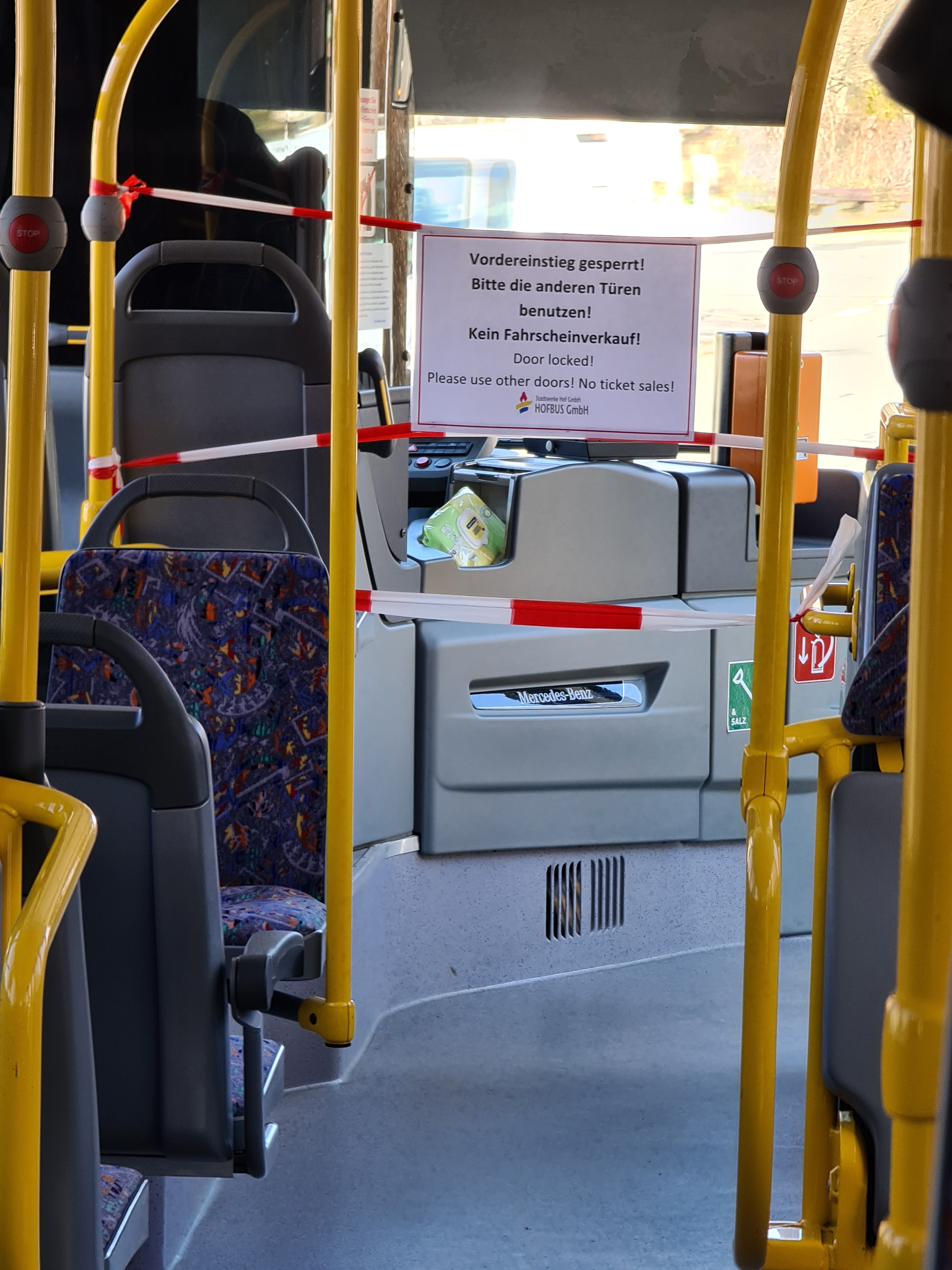 Durch die Kontaktbeschränkung werden nun in Bussen Maßnahmen beschlossen. Zum einen gilt eine Mindestdistanz zum Busfahrer, zum anderen darf man nur noch hinten aus- und einsteigen. Das Bezahlen funktioniert über ein Konto. Passagiere müssen mindestens 1,5 Meter voneinander entfernt sitzen. In den letzten 5 Tagen sollen jedoch nur 10 € eingegangen sein - von einer Person (laut Frankenpost).